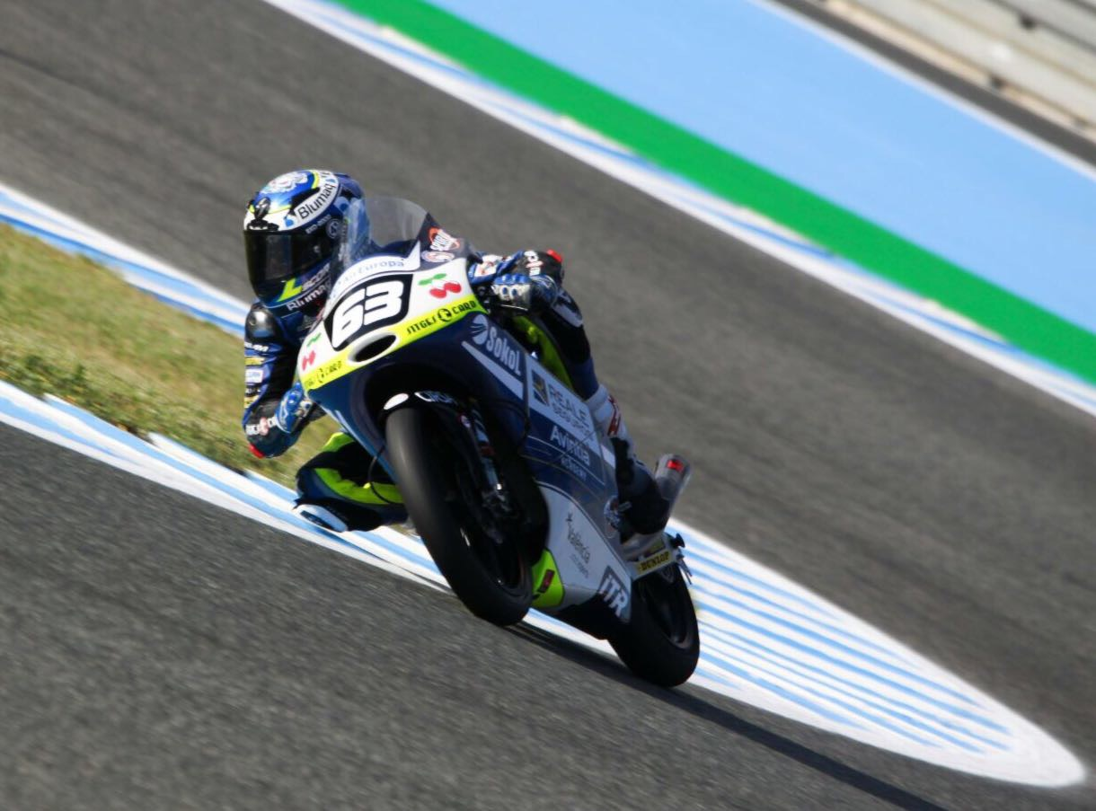 Vicente Perez